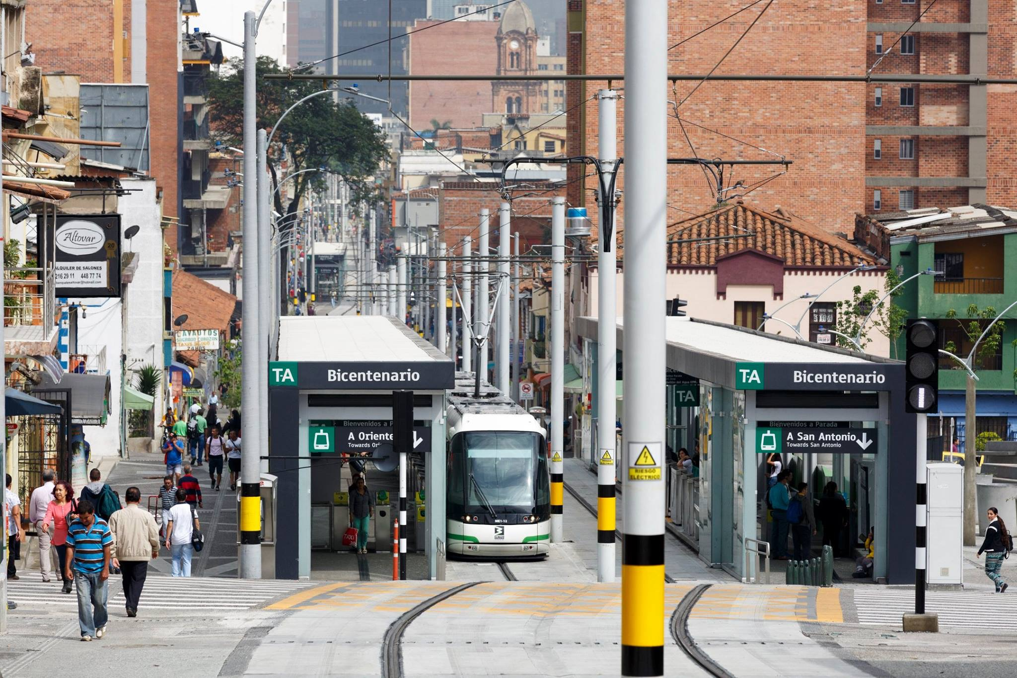 Estación Bicentenario (Metro de Medellín). Al fondo se aprecian los edificios del centro de MEdellín y la torre de la iglesia de San Francisco.